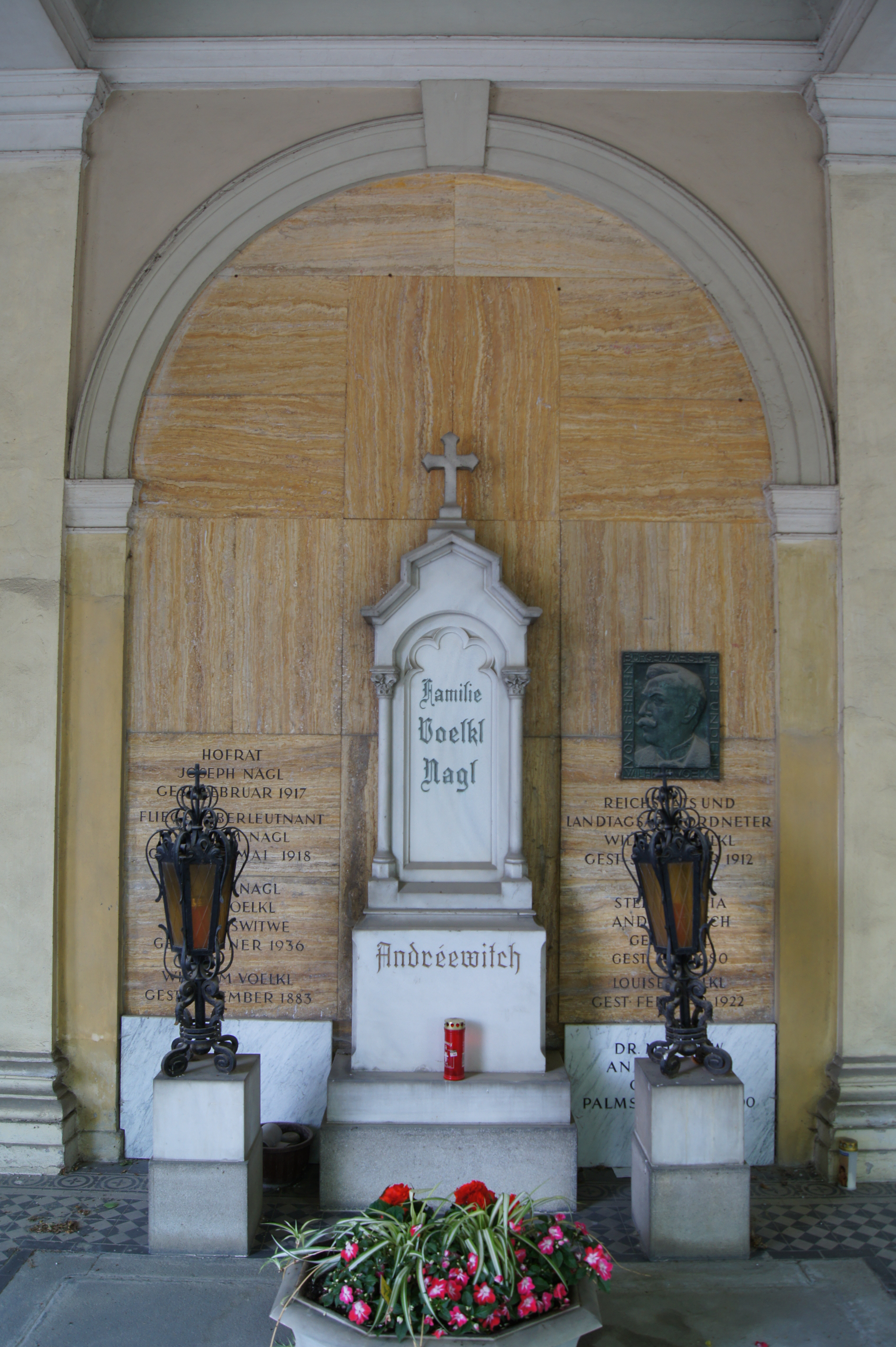 Städtischer Hauptfriedhof, Voelklgrab